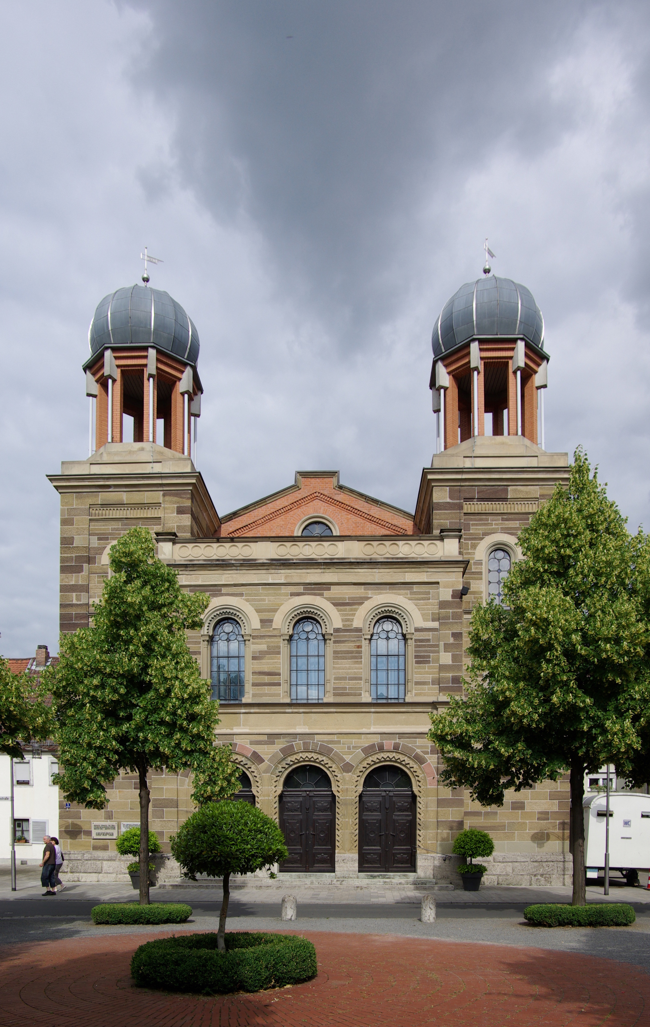 Kitzingen, Alte Synagoge, gebaut 1882 - 1883